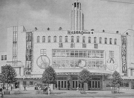 松竹少女歌劇団による『秋のおどり』『祖国』（1937年9月上演）の看板が掲げられた、国際劇場(International Theater)